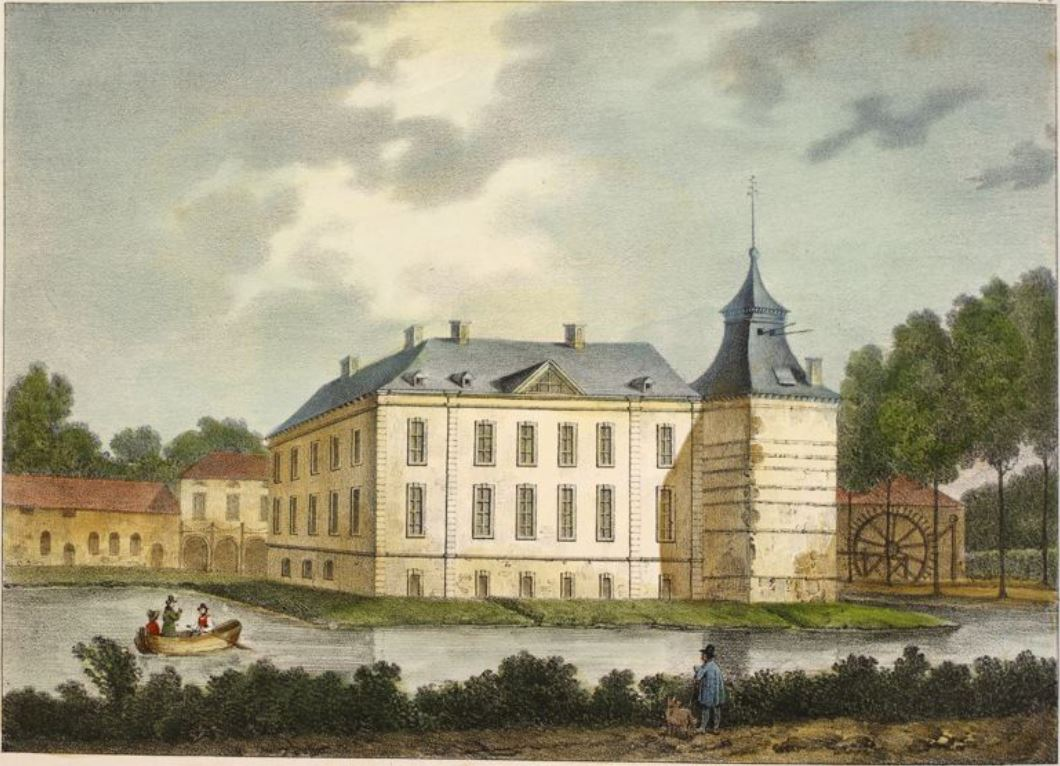 26. Château Borghitter, à Kessenich (Limbourg).